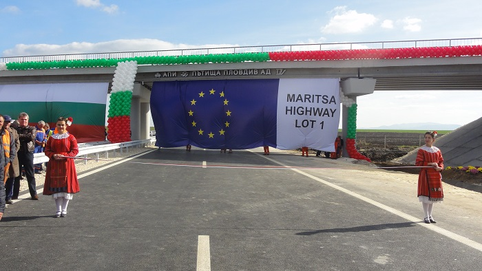 Лот 1 от автомагистрала "Марица"